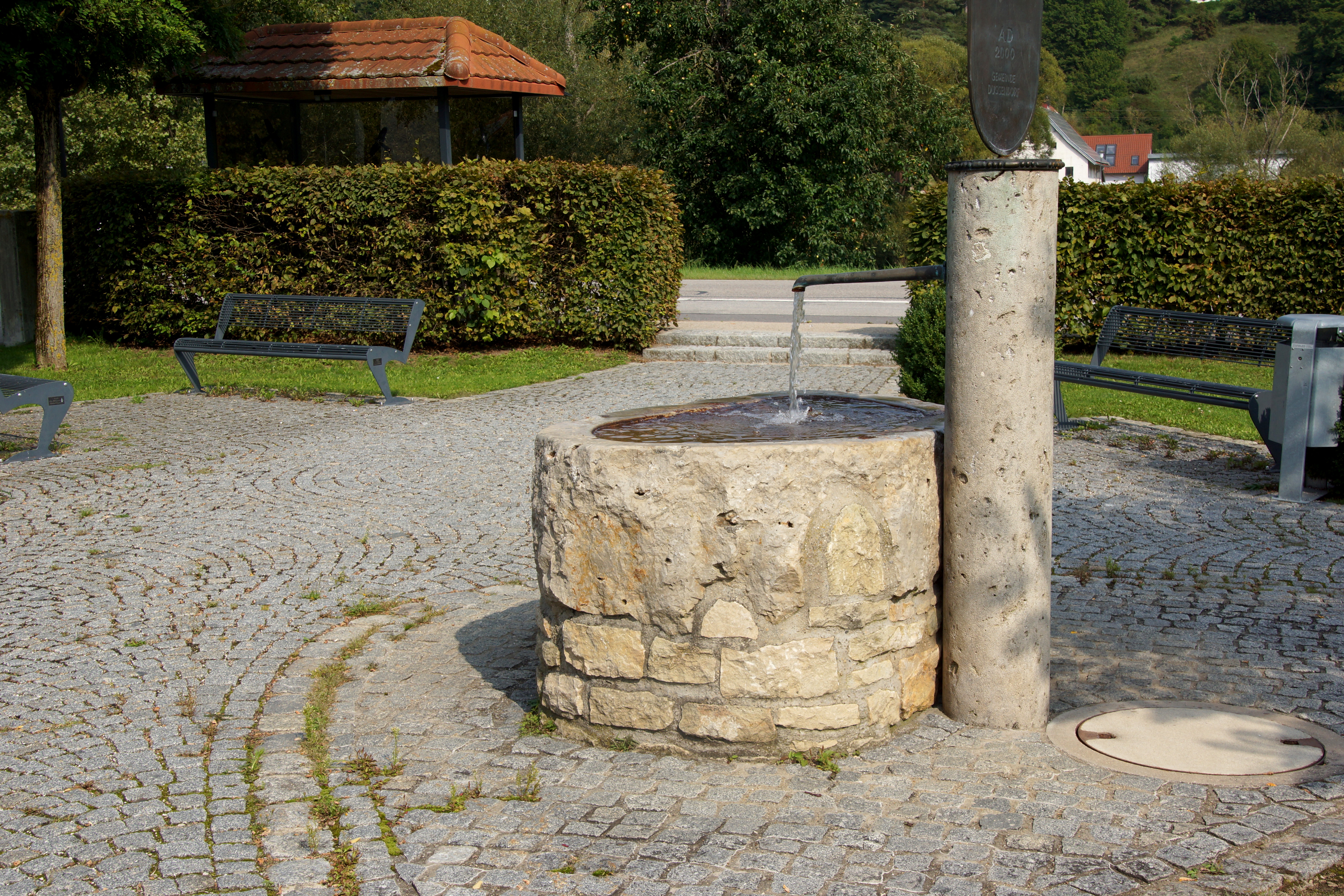 Duggendorf an der Naab